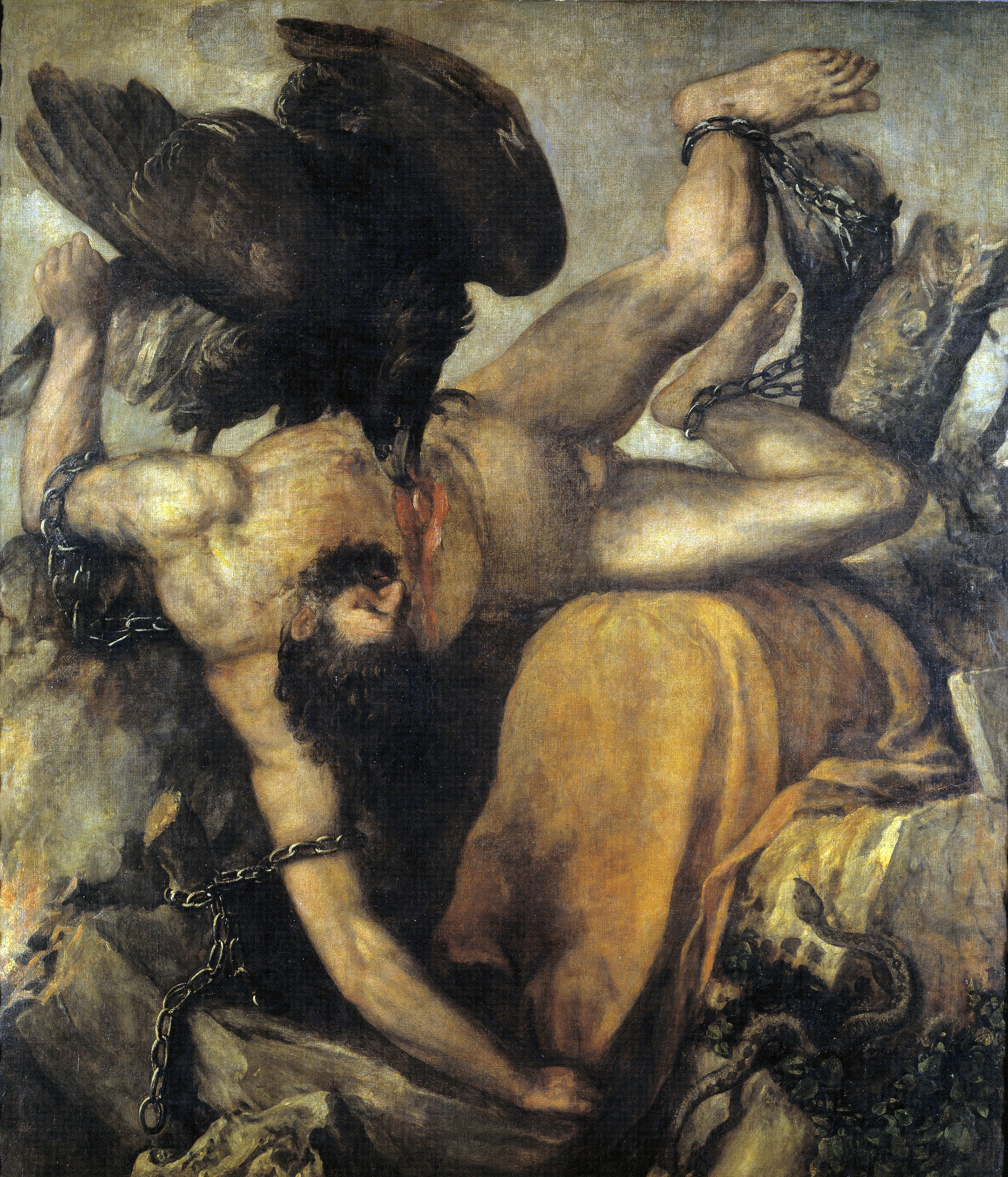 La obra representa a Ticio, a quien su padre, Zeus, condenó a sufrir el eterno castigo de que un buitre le devorara el hígado y de que este se regenerase continuamente, convirtiendo su suplicio en interminable.